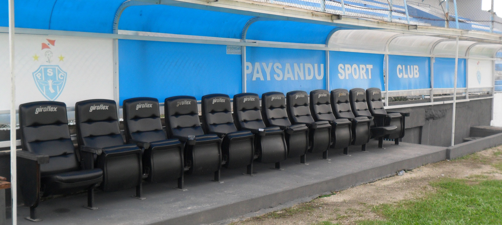 Banco de Reservas do Estádio da Curuzú, em 11 de Fevereiro de 2013.